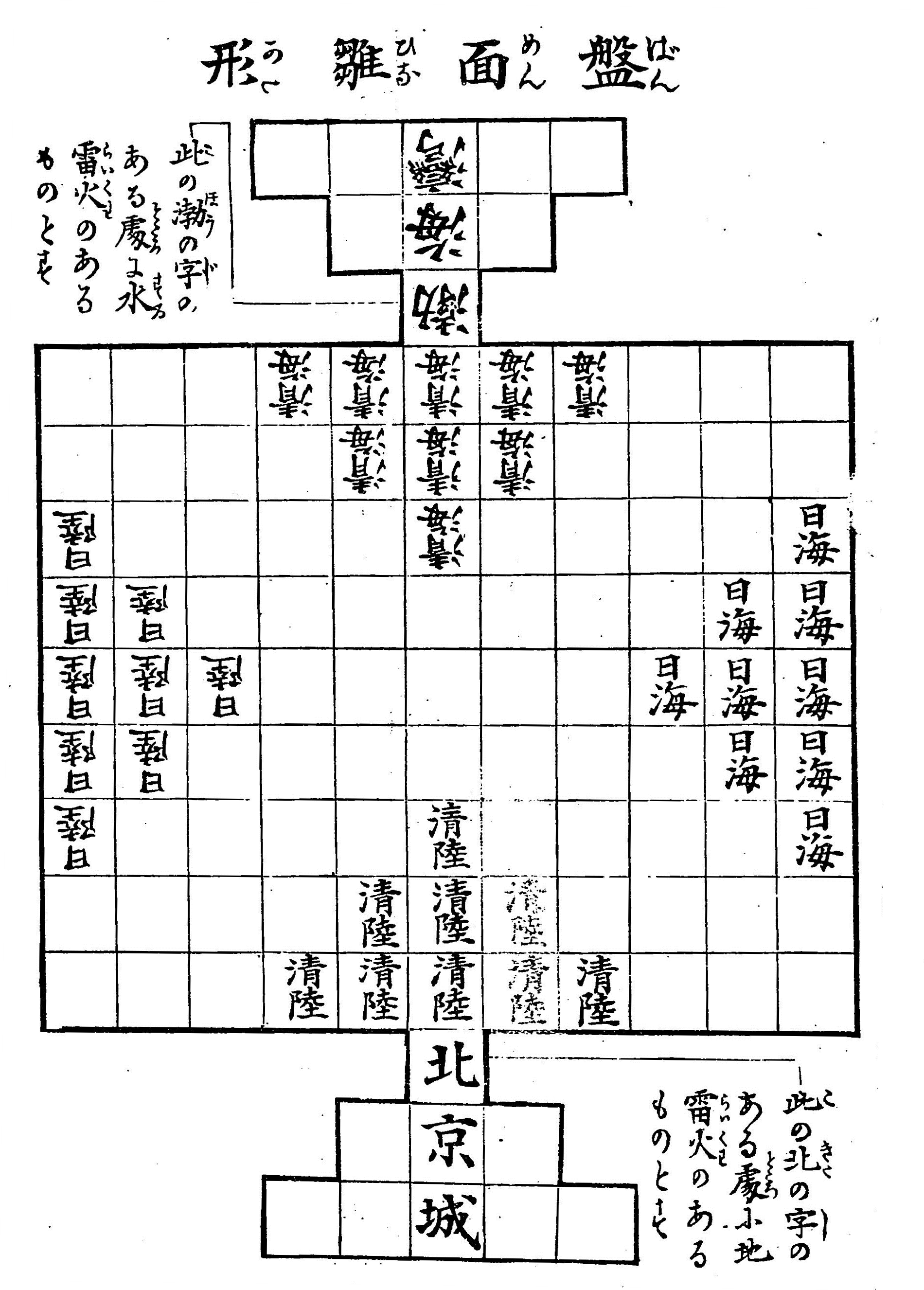 中文（台灣）: 征清將棋初始圖